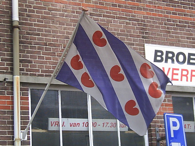 Frij fan rjochten. Mar ik fyn it wol aardich om te hearren at it earne oars brûkt wurdt.